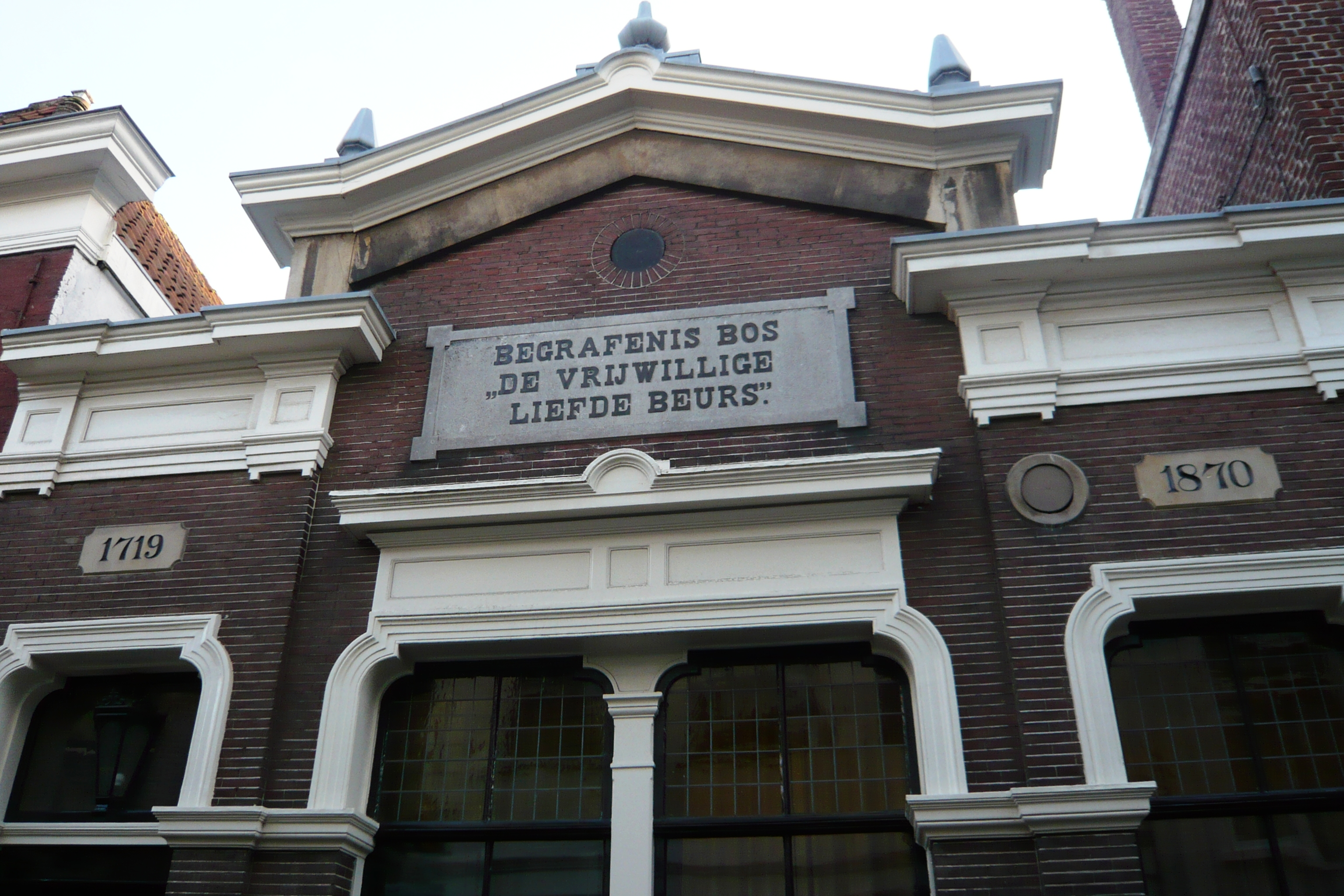 Begrafenis Bos "De Vrijwillige Liefde Beurs", location "De Onderlinge van 1719", designed by Adrianus van der Steur (1836-1899).